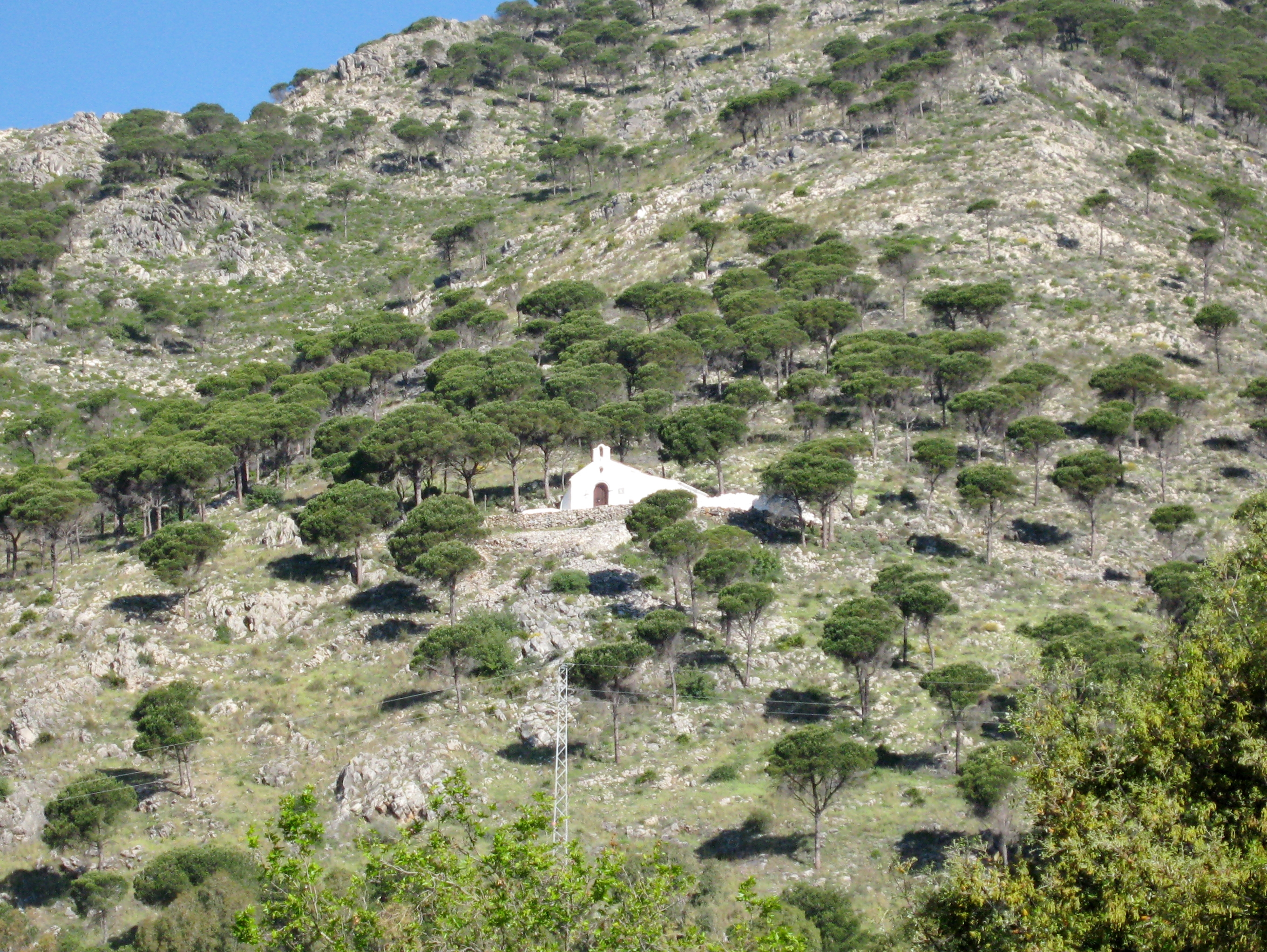 Ermita Nuestra Señora del Calvario, Mijas, Provinz Málaga, Andalusien, Spanien